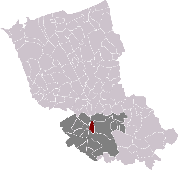 Locatie gemeente Waalskappel in arrondissement Duinkerke. Zelfgemaakt. Location of Wallon-Cappel municipality in the arrondissement of Dunkirk. Self made. Localisation de la commune de Wallon-Cappel dans l'arrondissement de Dunkerque. Fait moi-même.